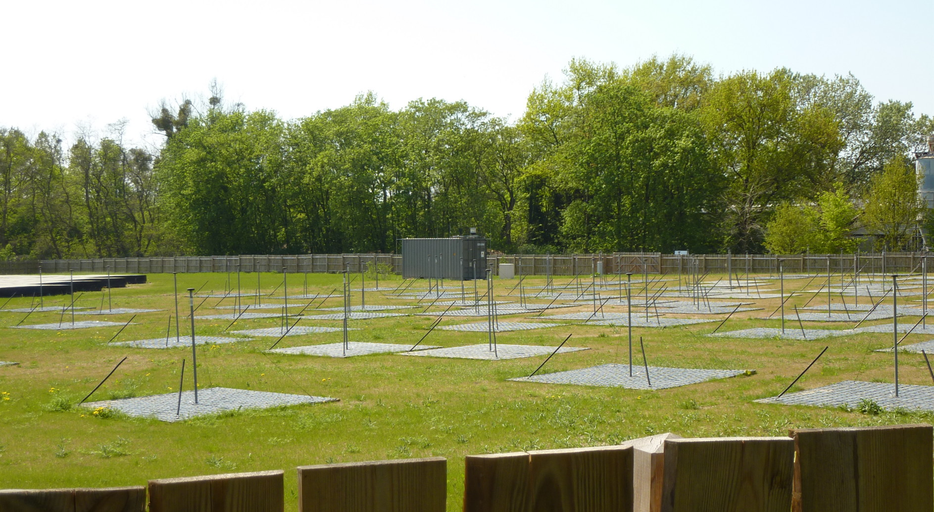 LOFAR Station des Astrophysikalischen Instituts Potsdam, AIP